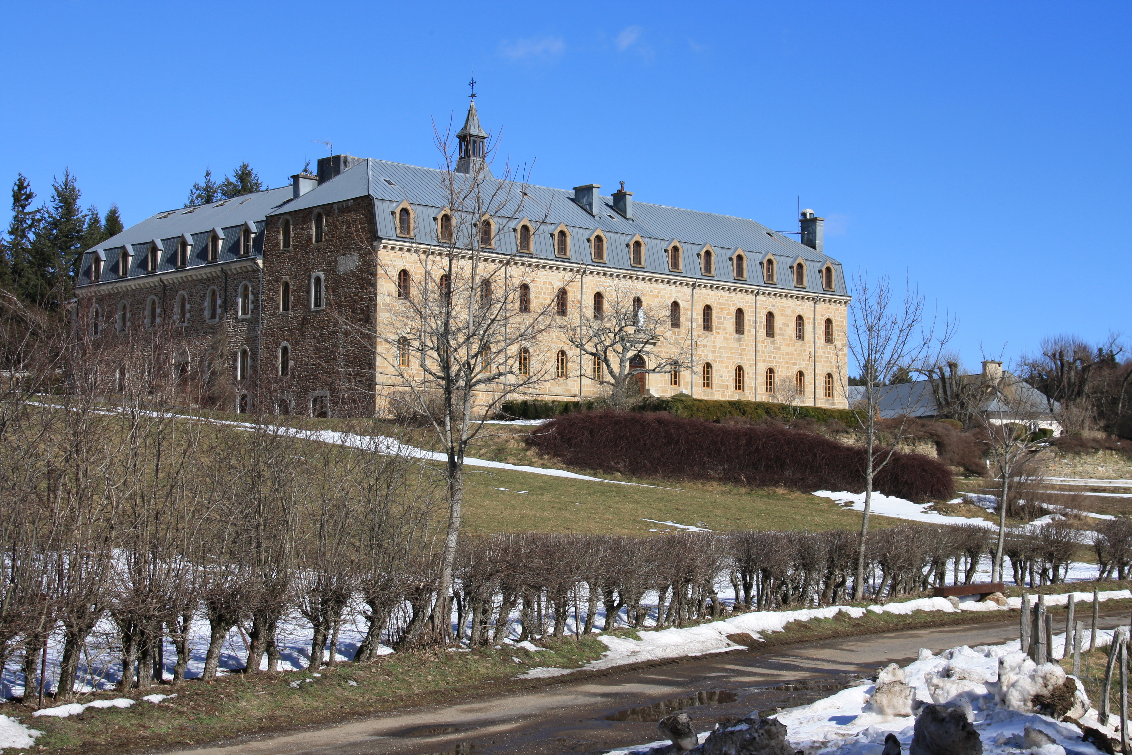 L'Abbaye Notre-Dame-des-Neiges à Saint-Laurent-les-Bains (Ardèche).